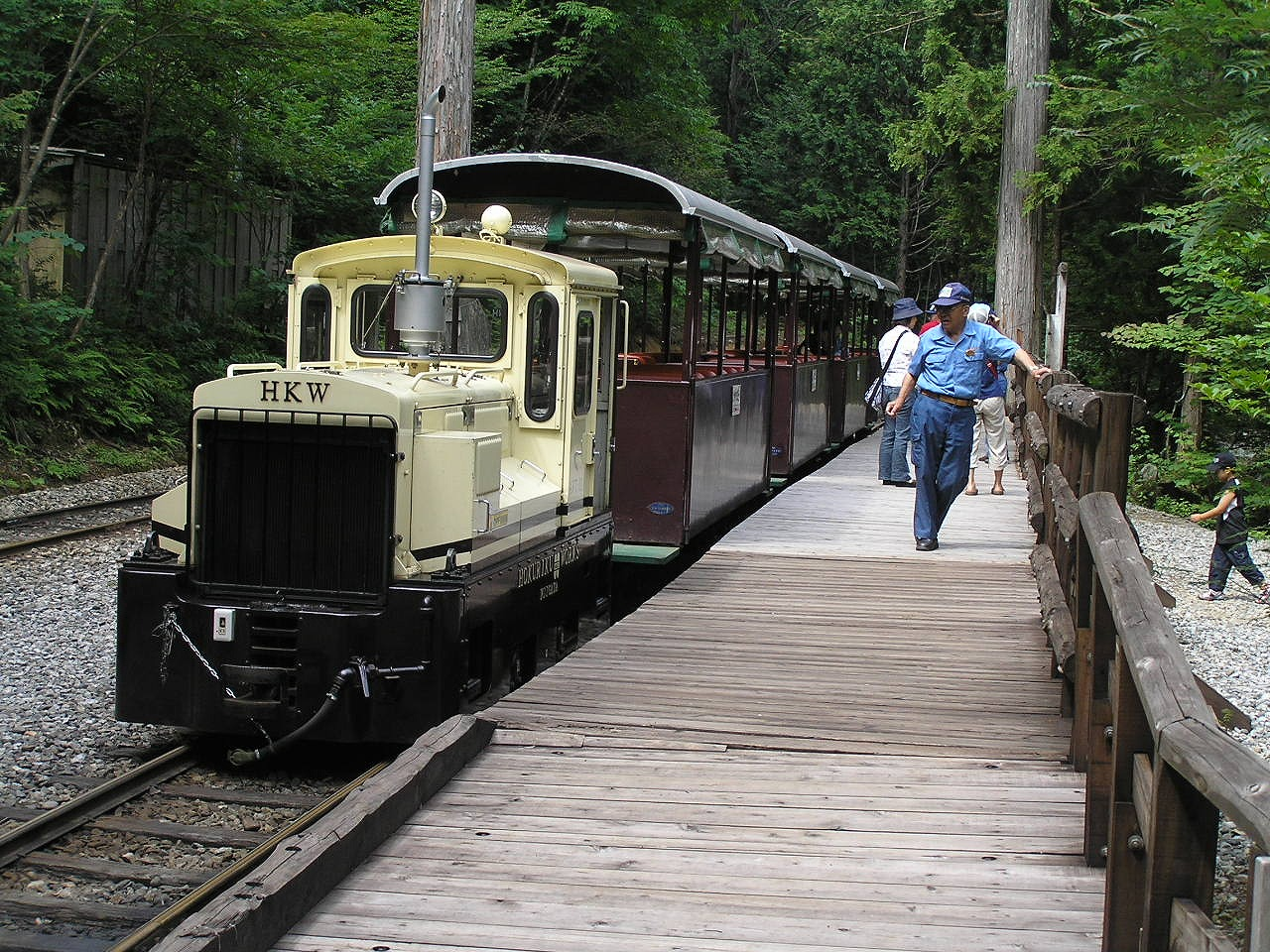 赤沢自然休養林森林鉄道丸山渡停車駅